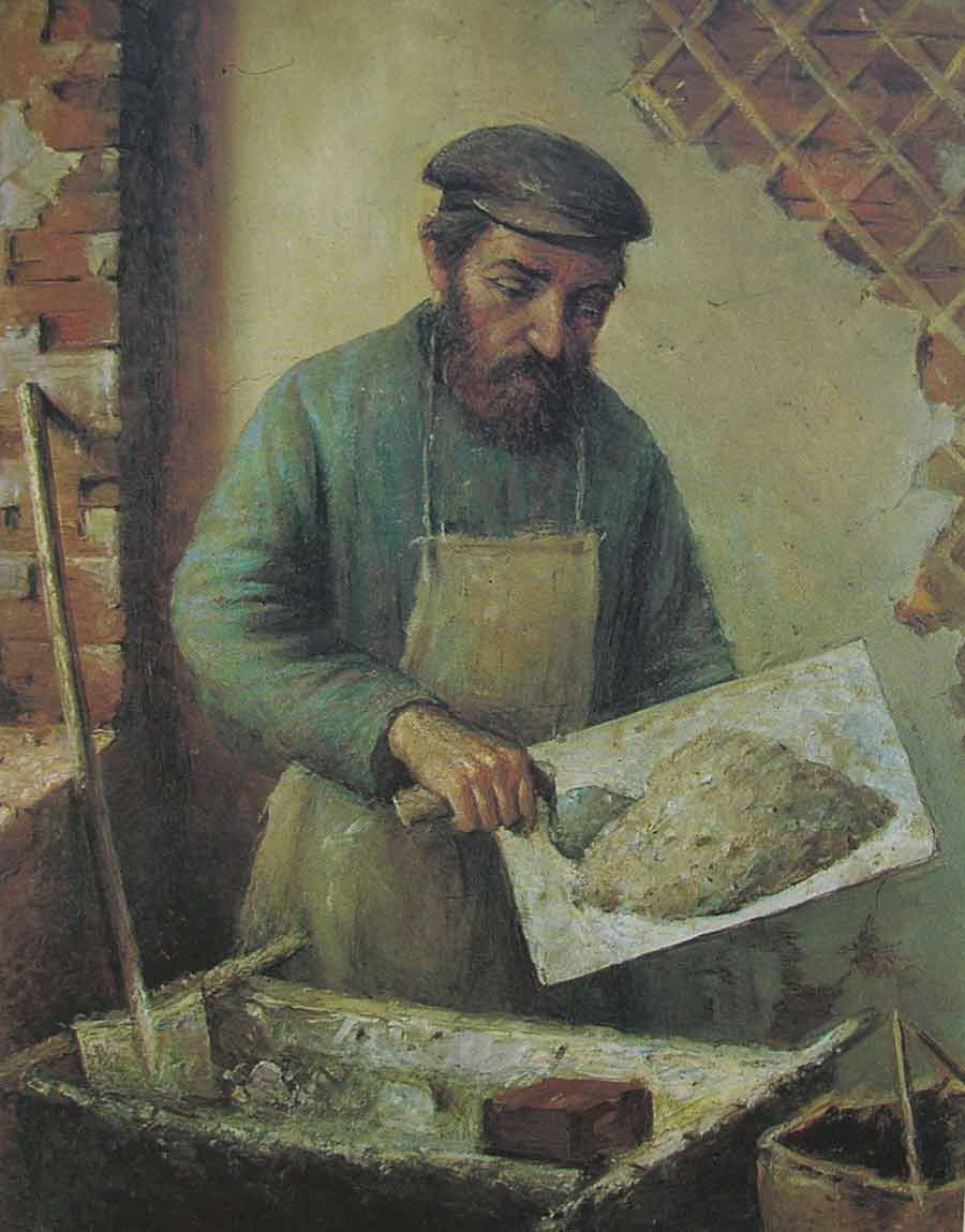 Еврей-штукатурщик